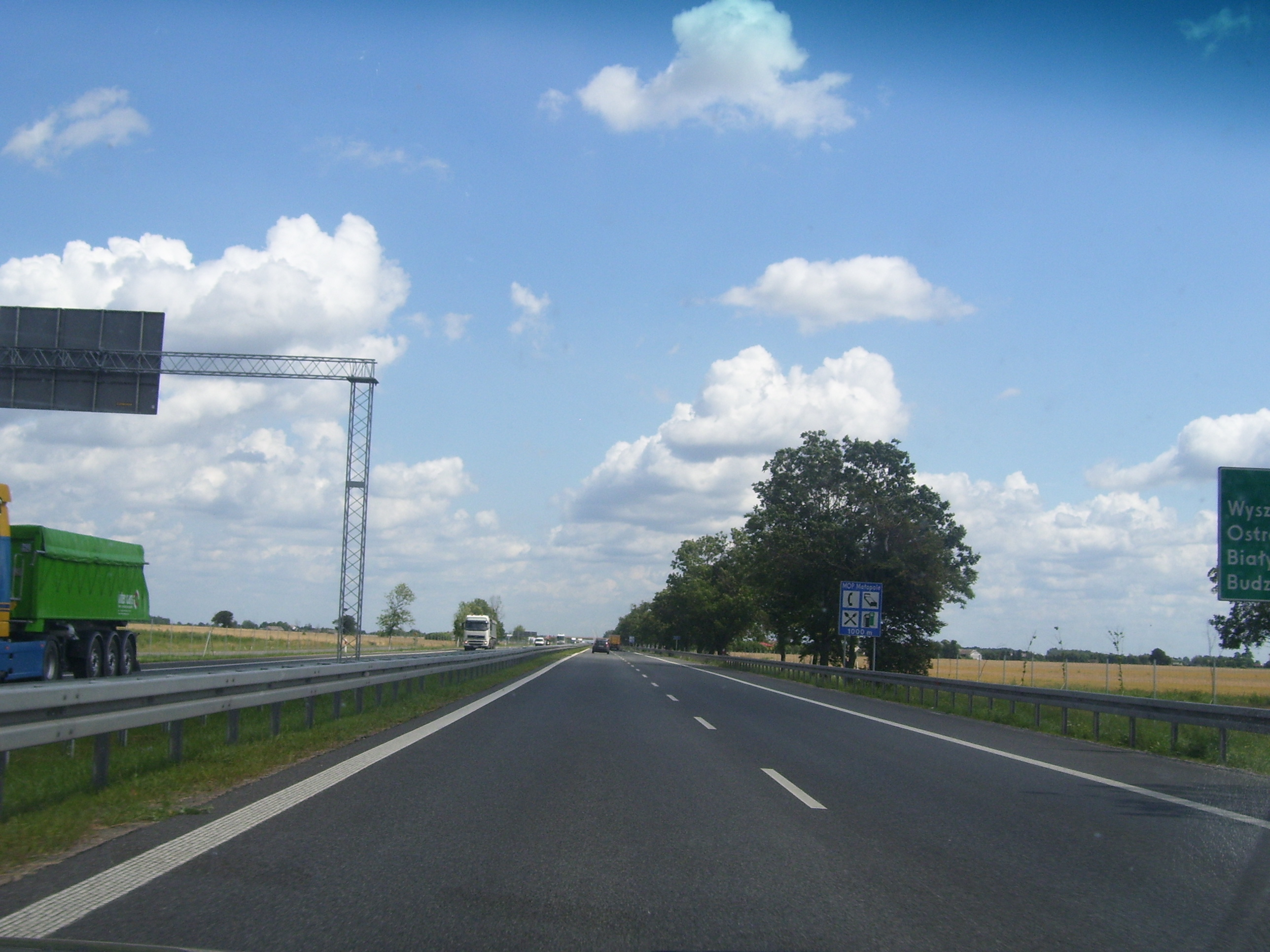 DK8 (Poland) S8 w okolicach MOP Małopole